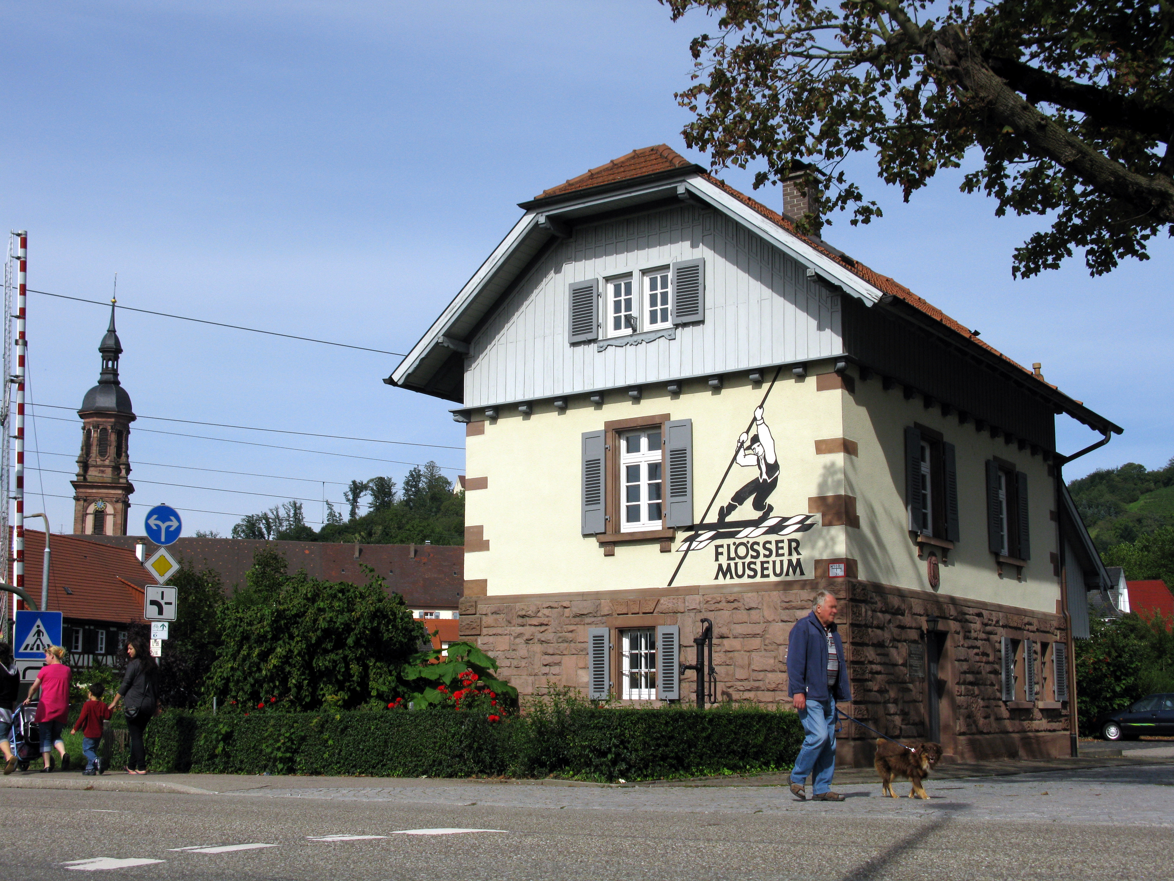 Flößermuseum im früheren Schrankenwärterhäuschen an der Schwarzwaldbahn, sowie Turm von St. Marien in Gengenbach